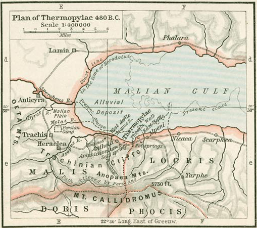 Sezione della mappa File:Shepherd-c-016.jpg